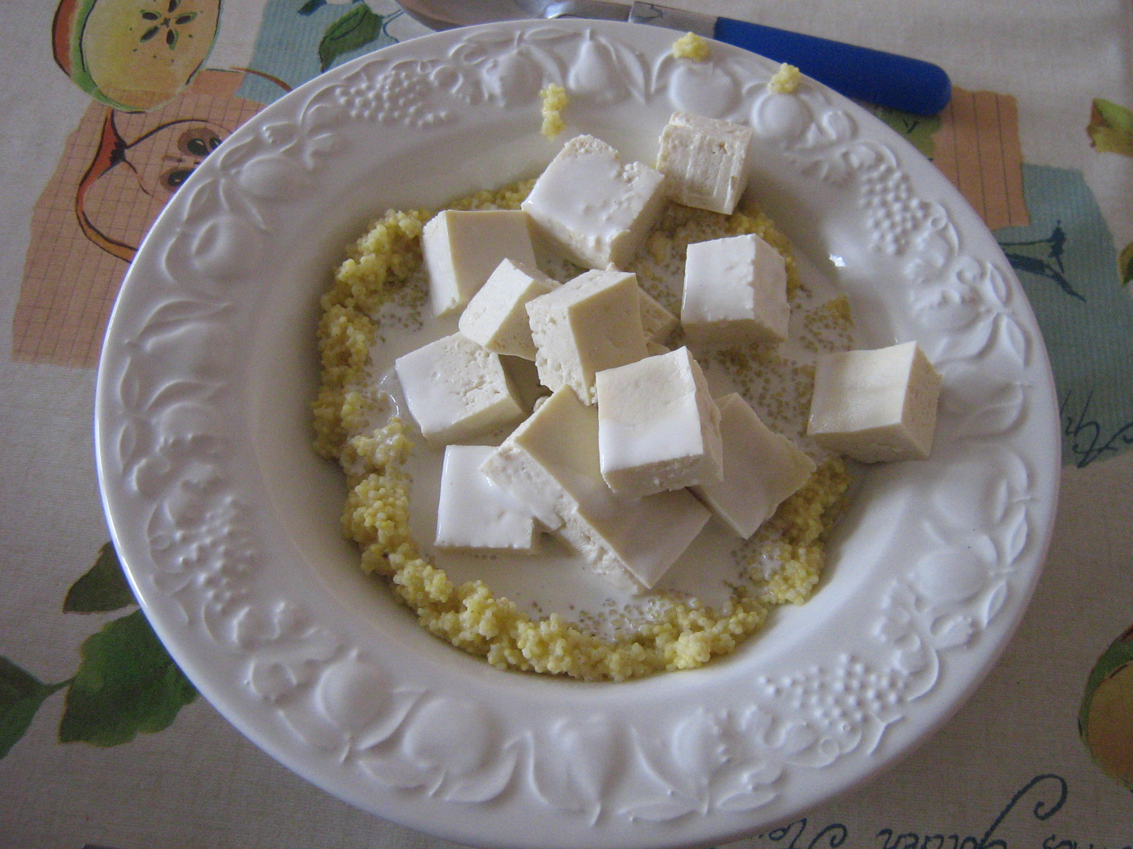 Polenta de millet, au tofou et à la crème de soja.